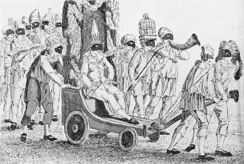 Bilder3 zu Goethes Römischen Carneval Radierungen von Georg Melchior Kraus nach Georg Schütz zu Goethes 1789 erschienem Buch. Goethe nahm beobachtend und den "entschiedenen Verlauf" dieses "Nationalerzeugnisses" darstellend im Februar 1788 am Römischen Carneval teil.